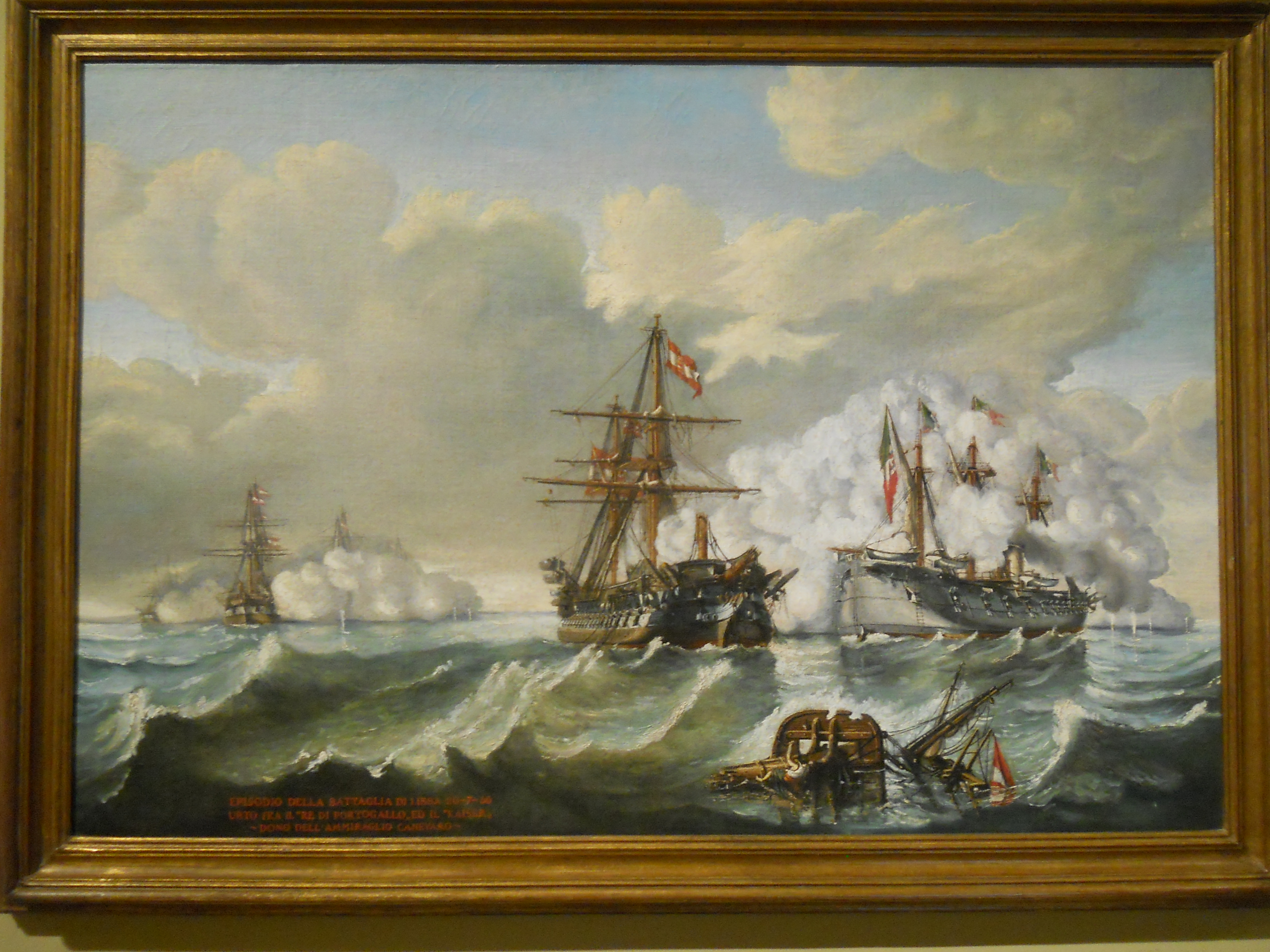 Szene aus der Schlacht bei Lissa 1866